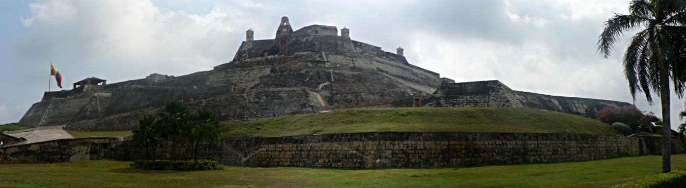 San Felipe de Barajas (Cartagena, Colombia)